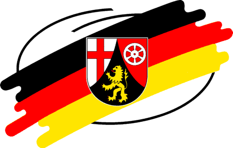 Landeszeichen des Landes Rheinland-Pfalz / Symbol of Rhineland-Palatinate